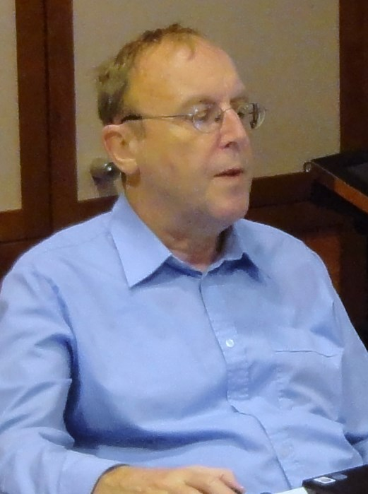 Heinz Wirthensohn, Schachfestival Basel 2014